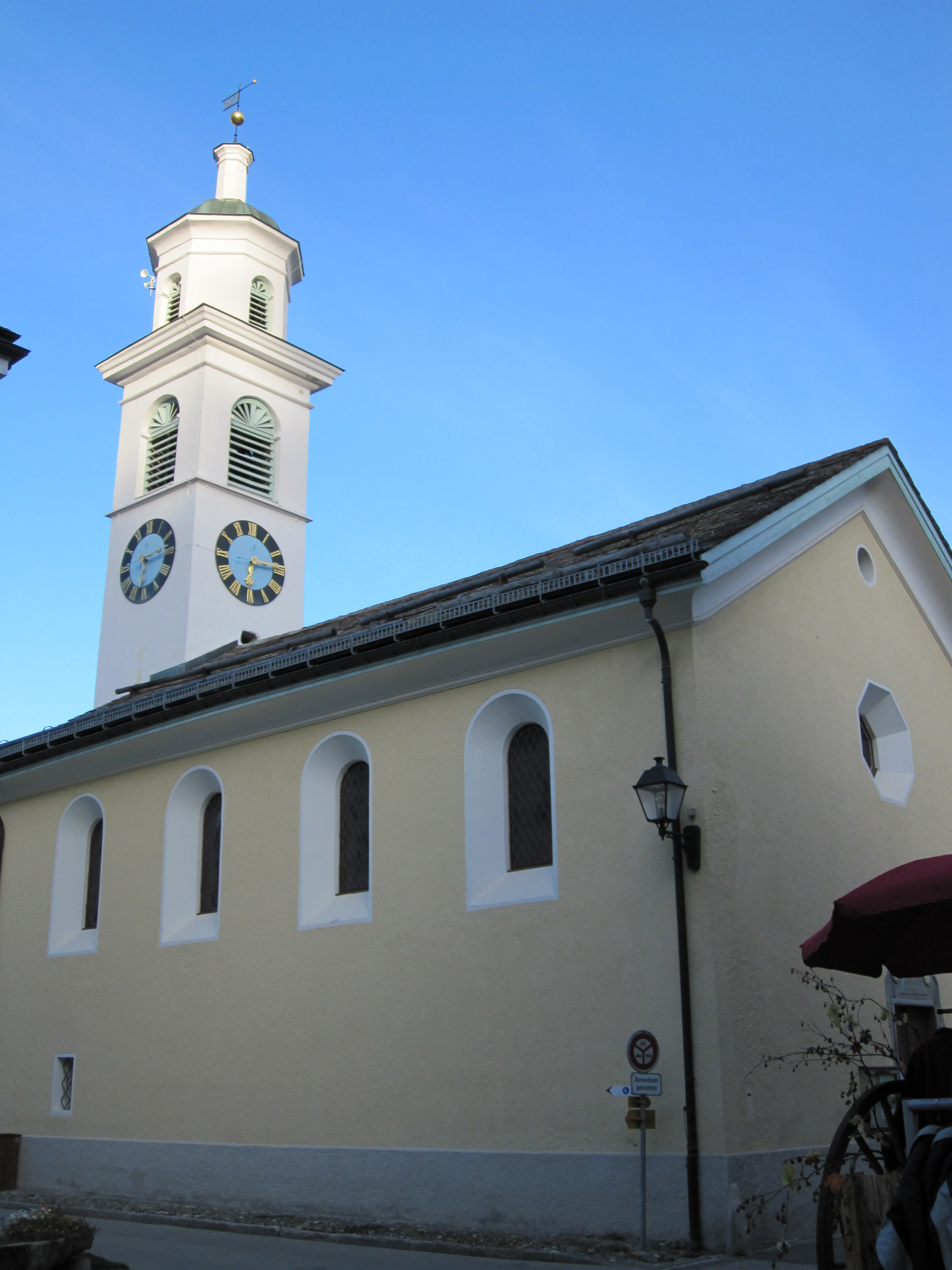 reformierte Kirche Sils Maria (Oberengadin, Kanton Graubünden)